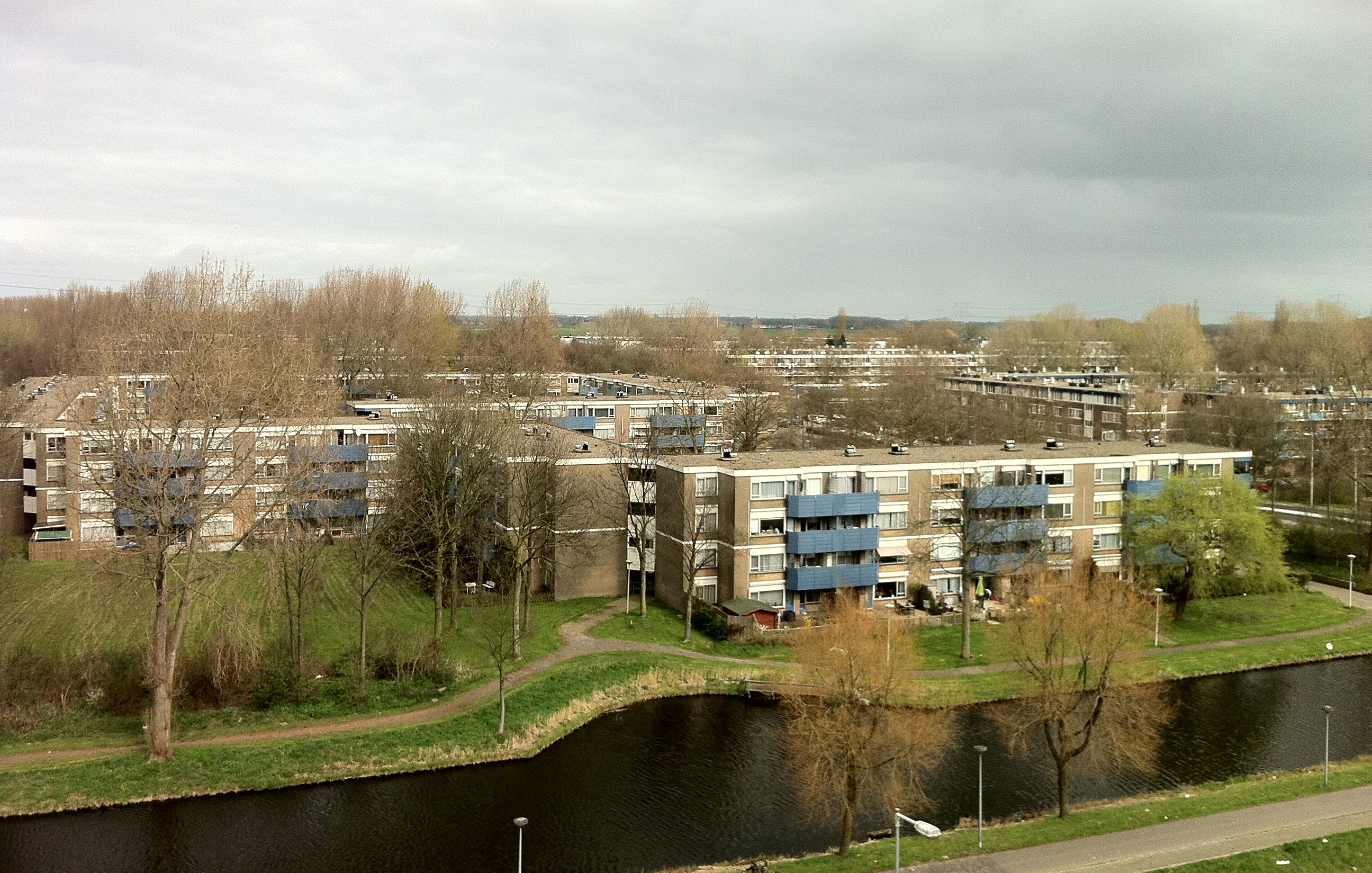 Amsterdam - De Banne-Noord. Deze uitbreidingswijk werd tussen 1971 en 1978 aangelegd op grond, die in 1966 van de gemeente Landsmeer was overgenomen. In 1974 was het nog een zandwoestijn, in de loop van oktober 1975 kwamen de eerste huizen gereed, in 1977 woonden er 7.500 mensen en in 1978 was Banne Noord volgebouwd.